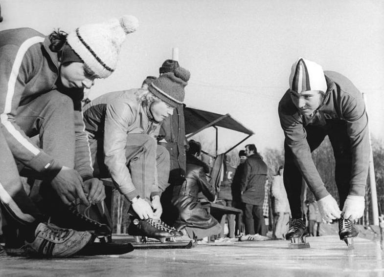 Manfred Winter, Harald Oehme, Manfred Fischer ADN-ZB Thieme 22.12.74 Karl-Marx-Stadt: Startvorbereitungen für den zweiten Wettkampftag der DDR-Mehrkampfmeisterschaften im Eisschnellauf Von rechts: Manfred Winter (SC Karl-Marx-Stadt), der Titelverteidiger und Junioren-Weltmeister: Harald Oehme (TSC Berlin), der nach den ersten Tag bei den Männern in Führung lag; Manfred Fischer (SC Einheit Dresden). Abgebildete Personen: Oehme, Harald: Eisschnelläufer, DDR Winter, Manfred: Eisschnelläufer, SC Karl-Marx-Stadt, DDR